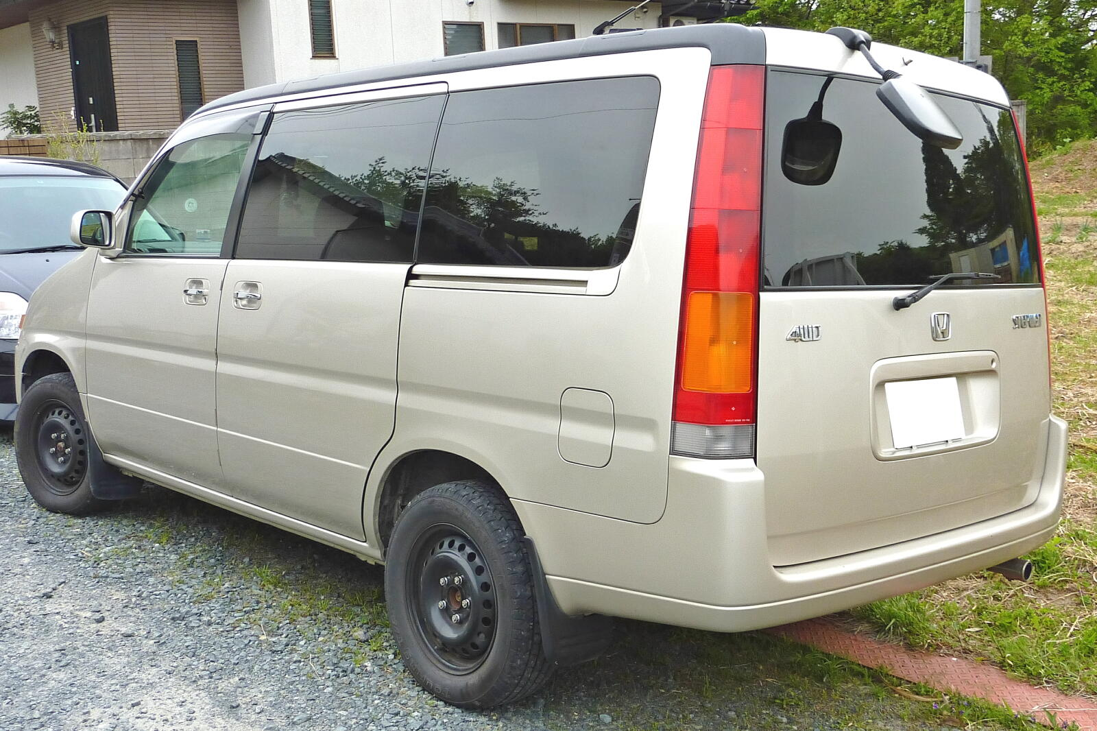 ホンダ・ステップワゴン（初代・前期型リア)